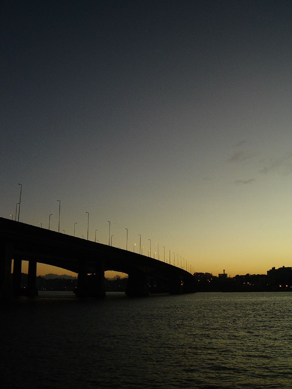 Ponte Colombo Salles ao entardecer. Florianópolis - Santa Catarina - Brasil